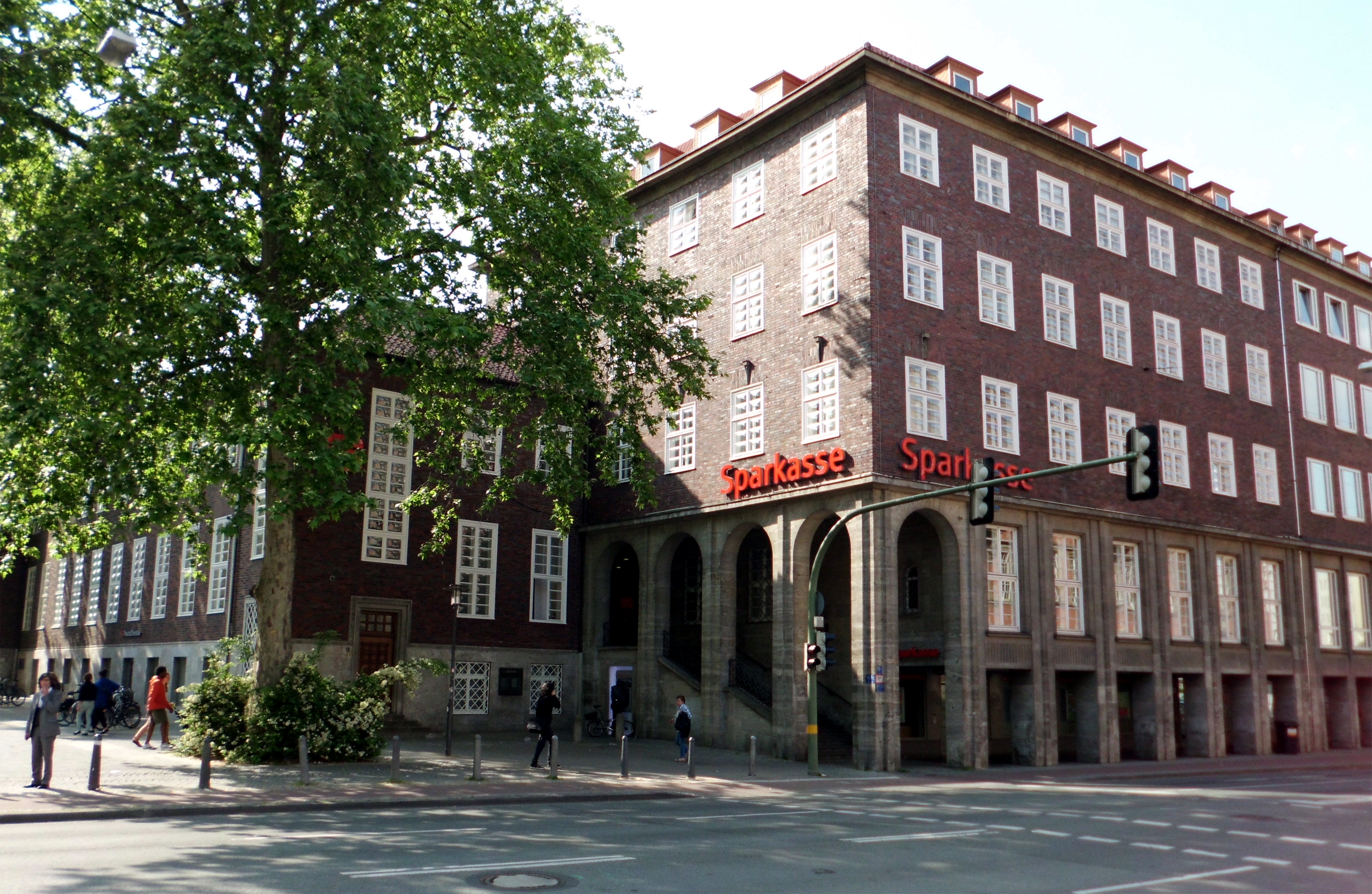 Bielefeld Denkmalnummer 44, historisches Sparkassengebäude Ecke Herforder - Stresemannstraße